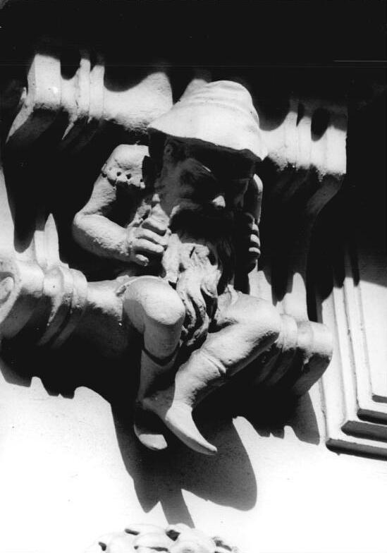 ADN-ZB-Settnik-3.5.86-pst-Berlin-ein wenig von oben herab darf der kleine Wichtelmann nun schon auf die Passanten in der Sophienstraße schauen. Mit den Fassaden erhielt auch dieses originelle Hauszeichen eine liebevolle "Verjüngungskur". -Siehe auch 1N und 3N -"